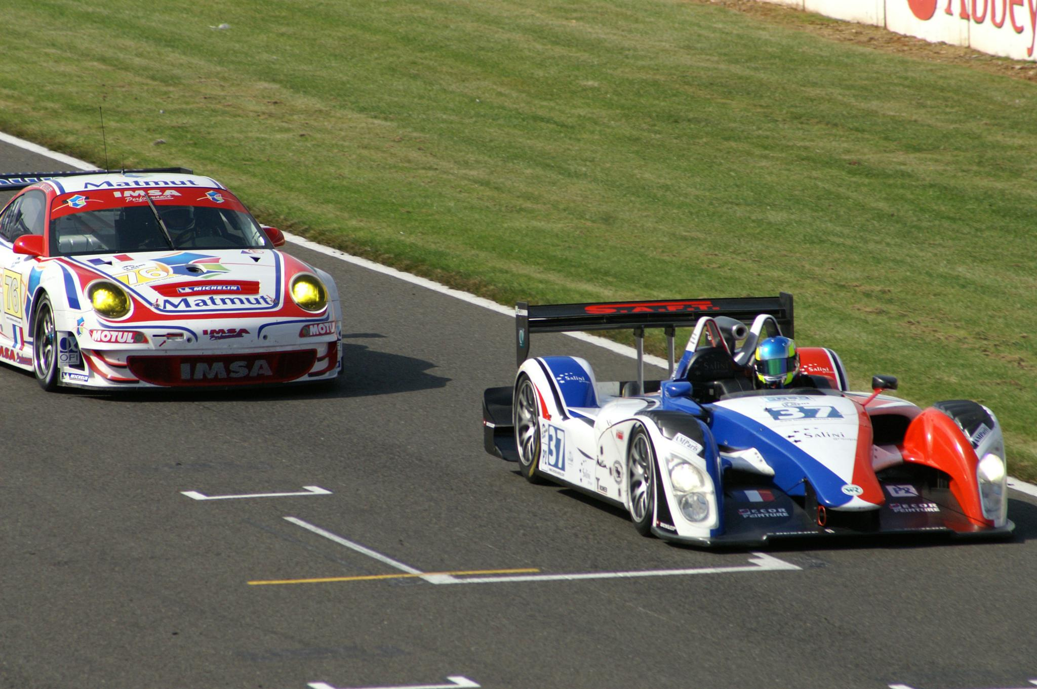 Silverstone Le Mans Series 1000K